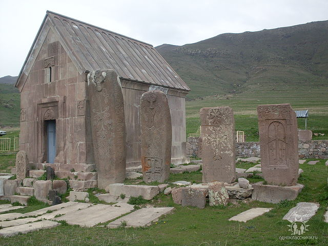 Սուրբ Աստվածածին-Աղավնաձոր